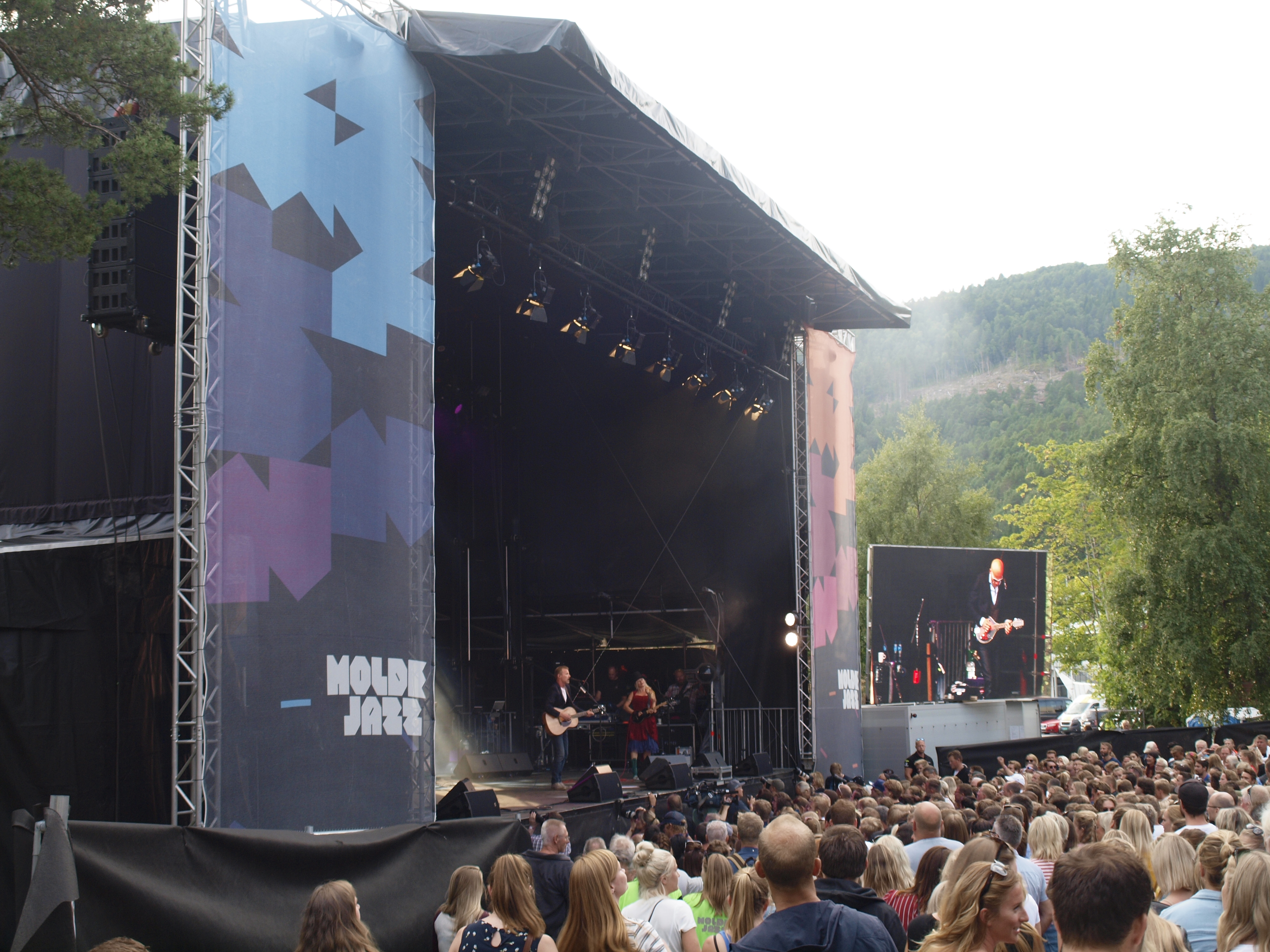 Di derre on Moldejazz 2018